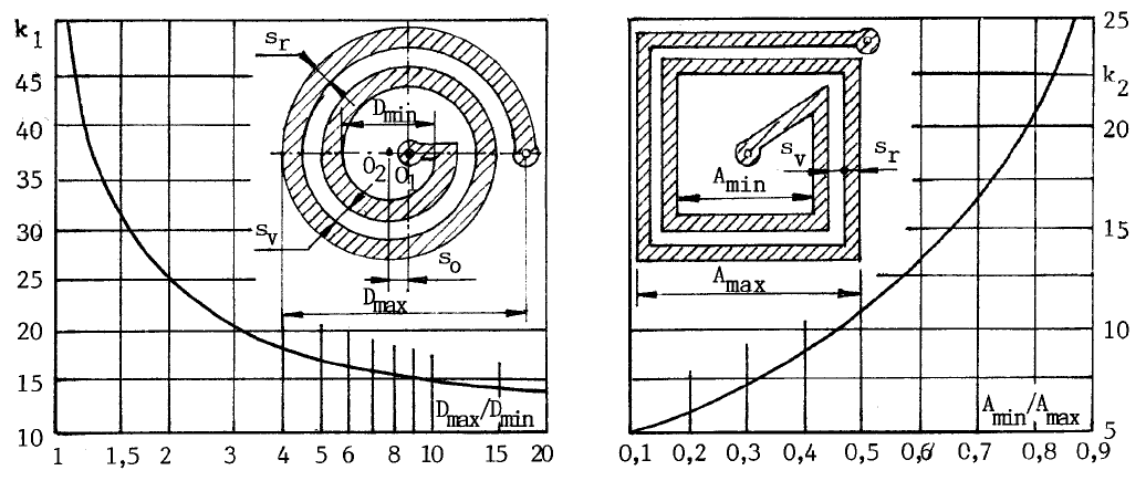 Ringspiraalse lamepooli ja ruutspiraalse lamepooli kujutegur